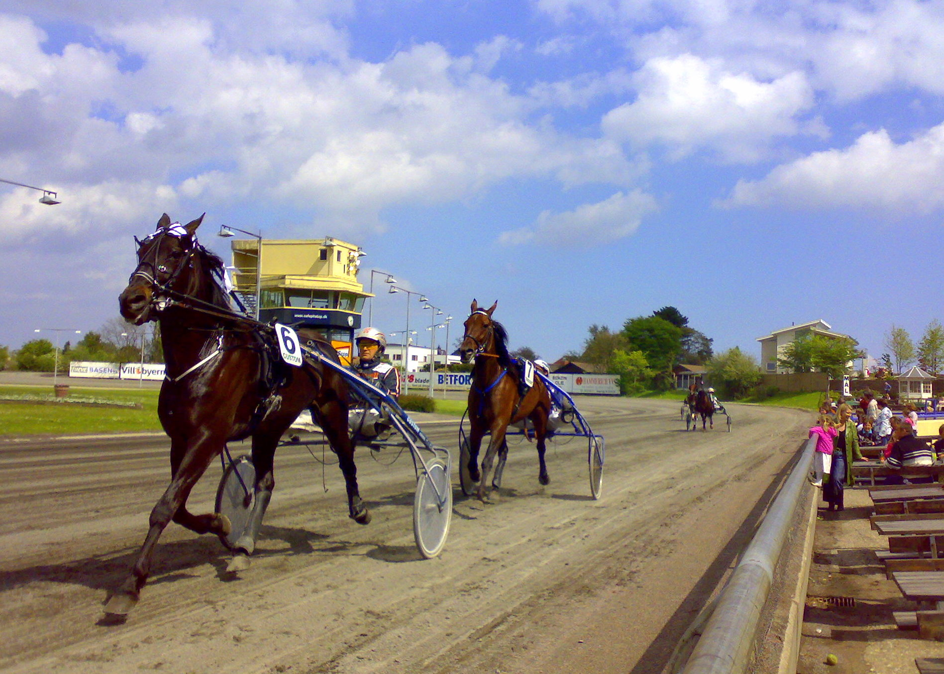 Opløb på Charlottenlund Travbane